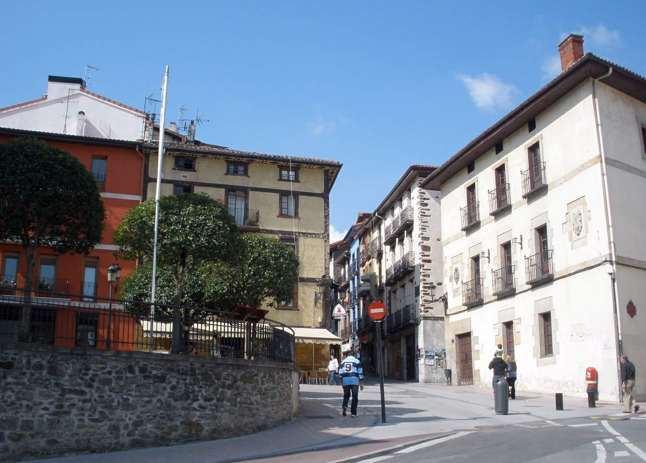 Ordizia, Guipúzcoa